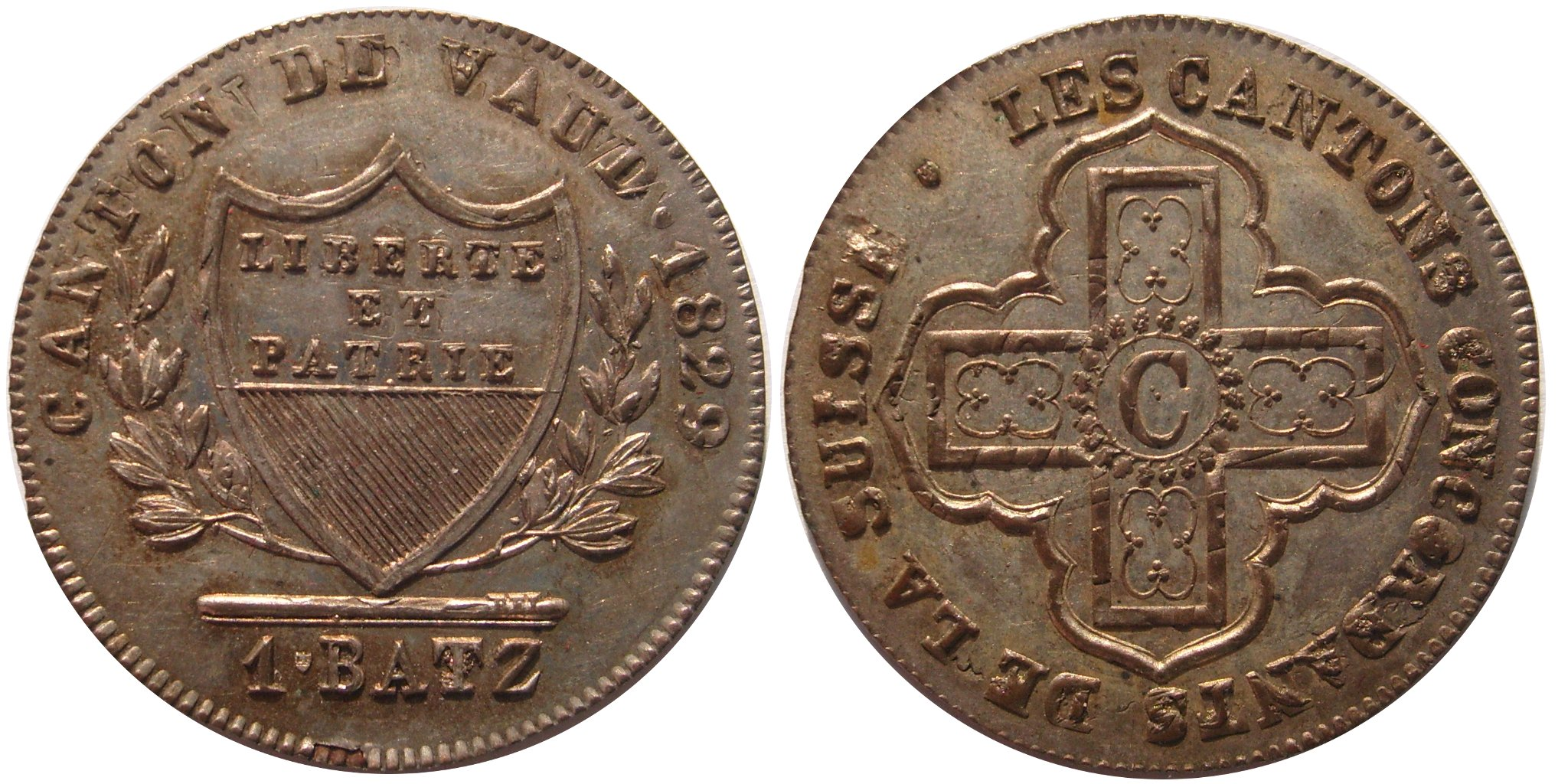 1 Batz, Canton de Vaud, 1829, type concordat.